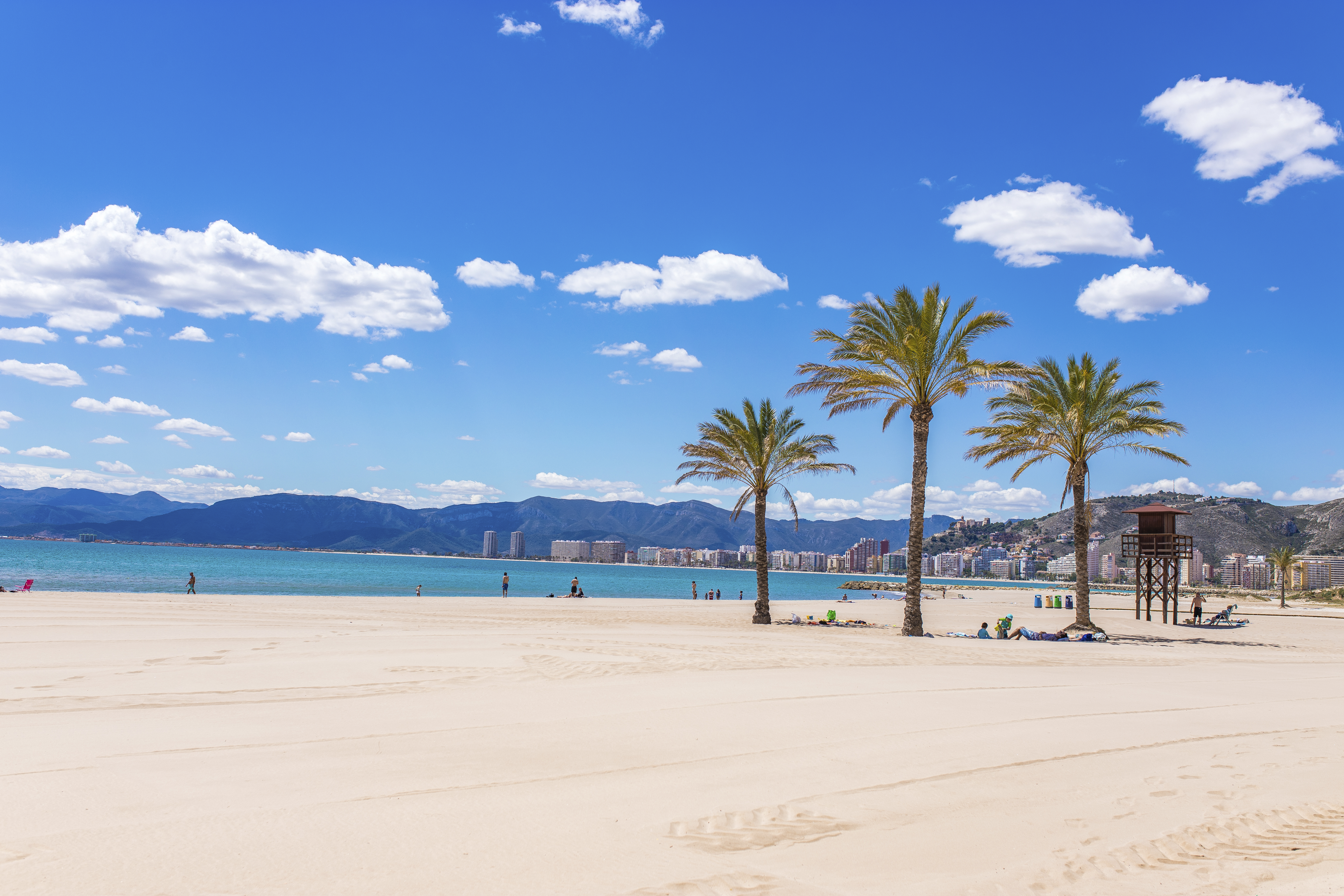 Una de las diversas playas de Cullera